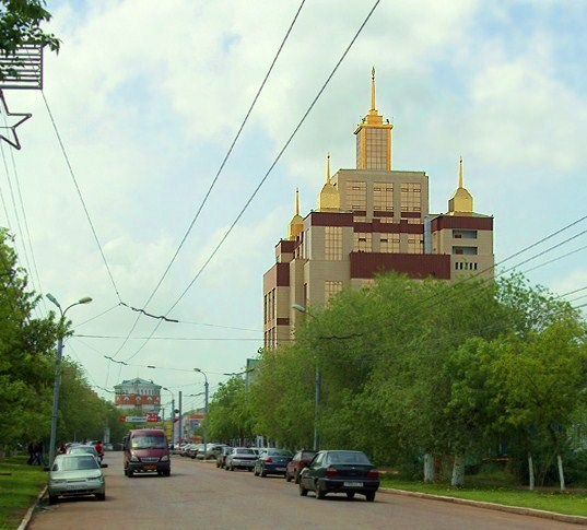 Orenburg State University